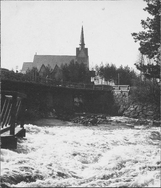 Kyrkan mot norr. Kategori: (01) Exteriörer Kyrkan mot norr.